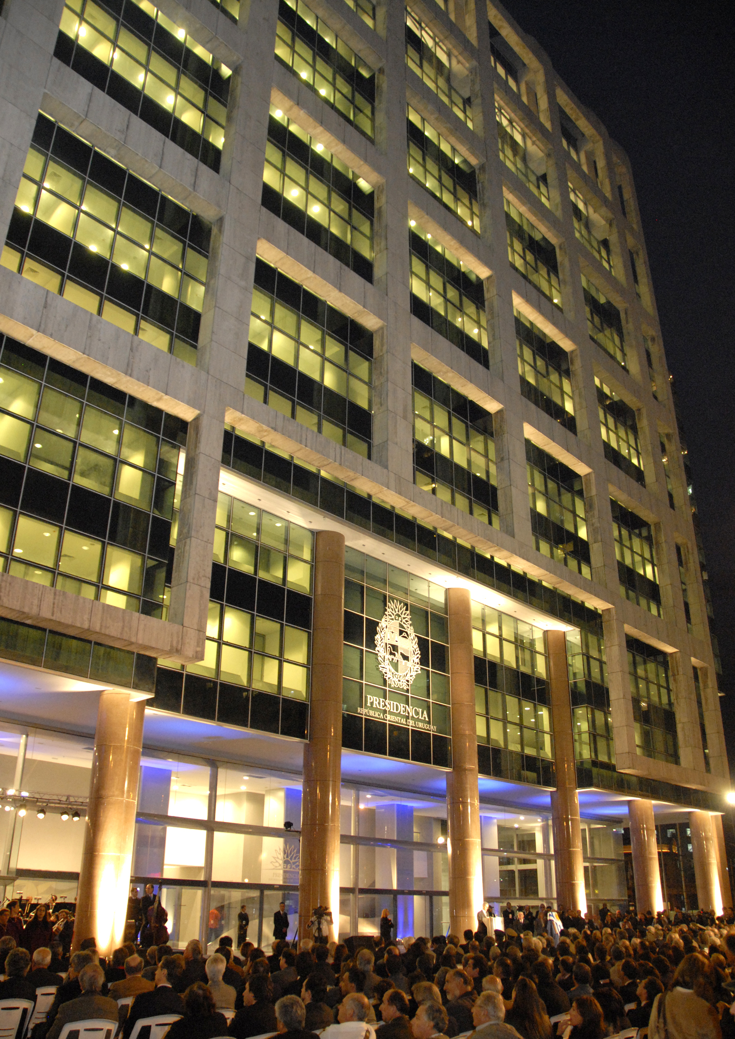 Torre Ejecutiva Plaza Independencia